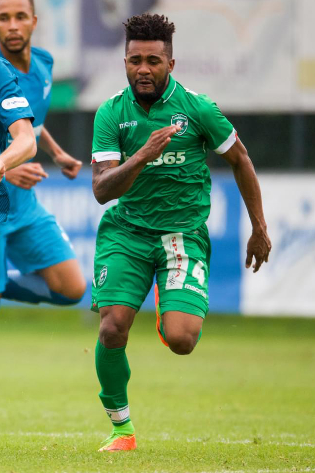 24.06.2017. Австрия, Гойнг-ам-Вильден-Кайзер. «Газпром»-тренировочные сборы в Австрии: товарищеский матч «Зенит» — «Лудогорец» (Разград).